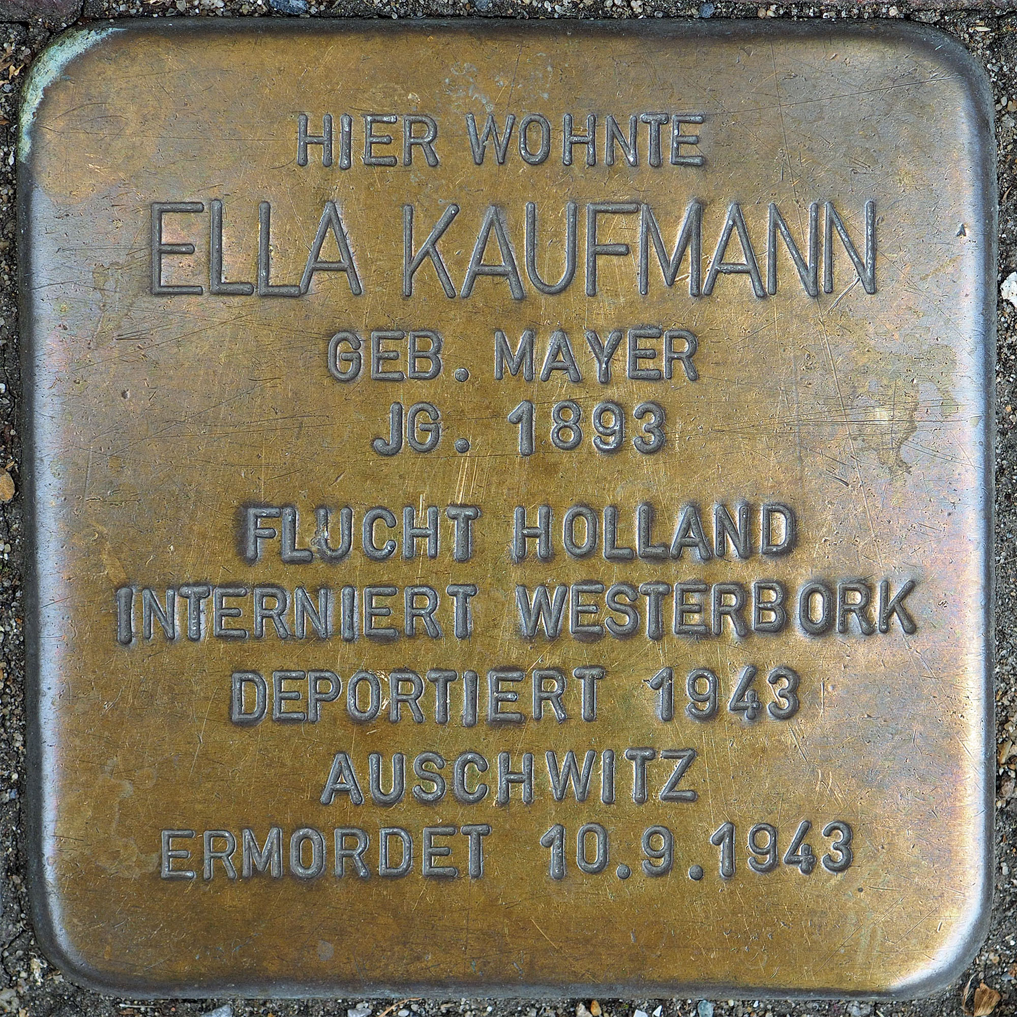 Stolperstein Geldern Hartstraße 2 Ella Kaufmann